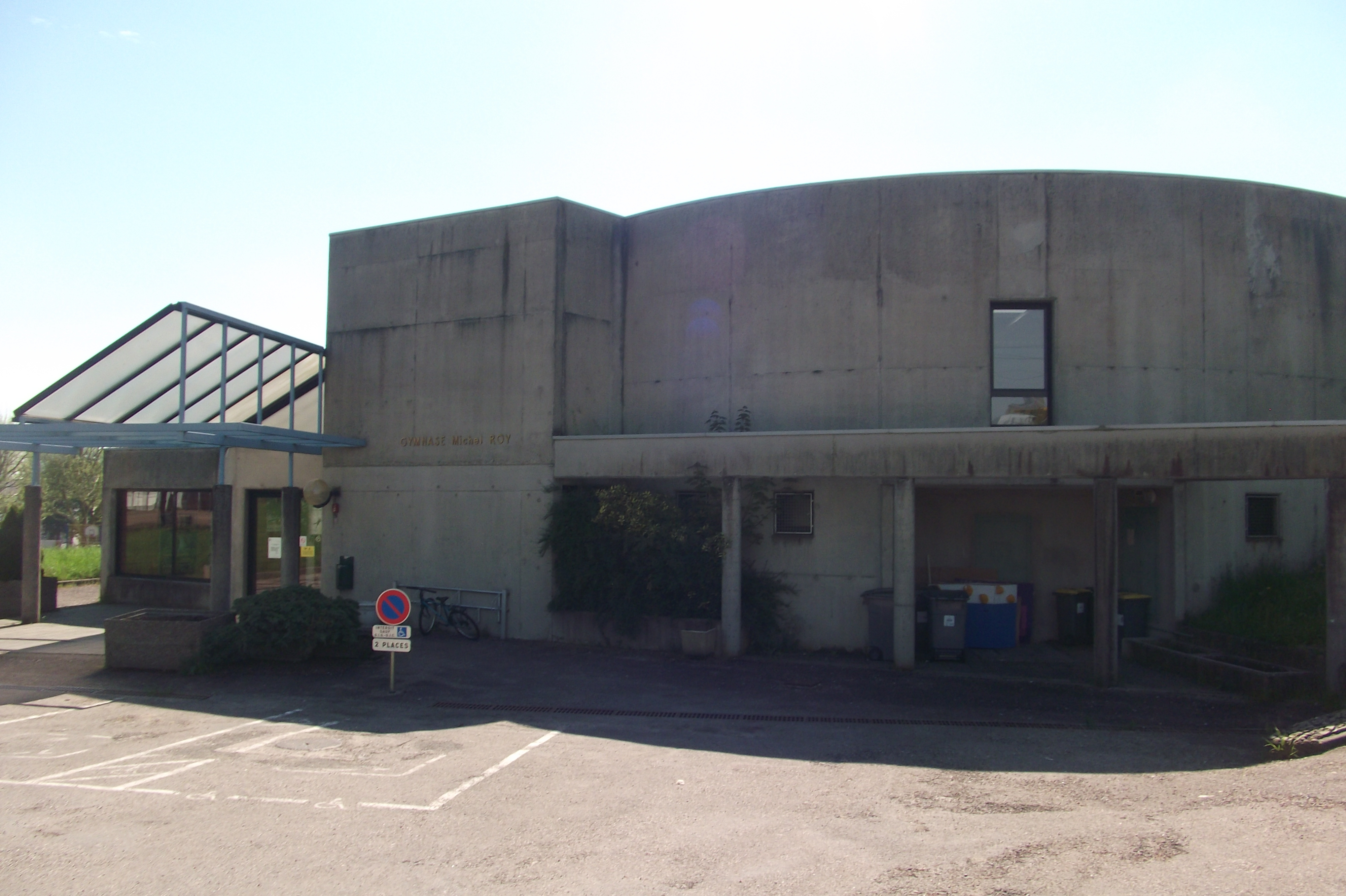 Le gymnase Michel Roy de Vesoul (Haute-Saône, Franche-Comté)